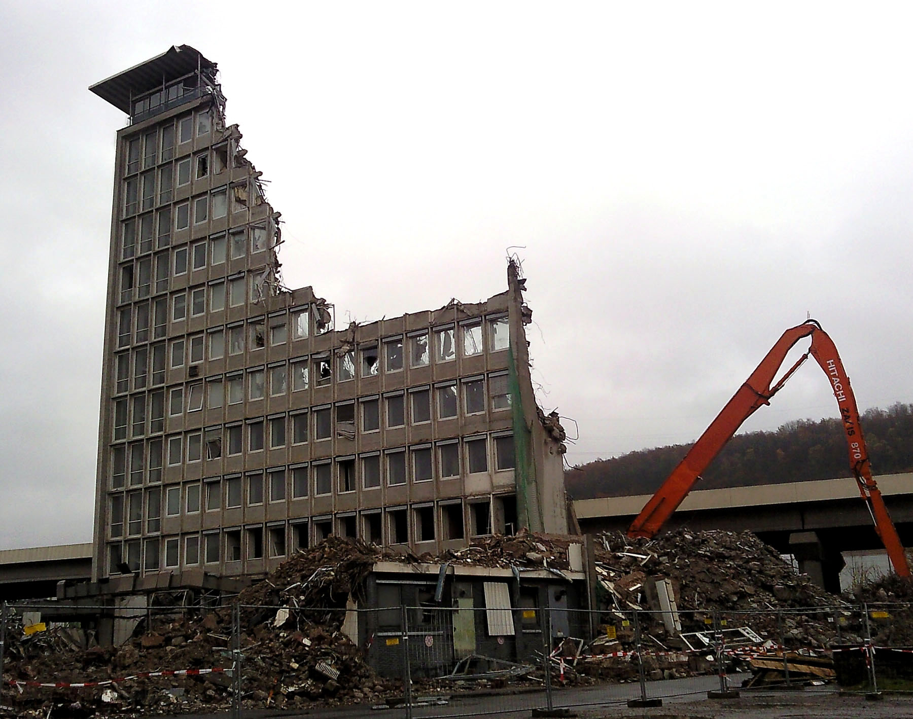 Das ehemalige Verwaltungshochhaus der Stahlwerke Südwestfalen AG (später Krupp-Stahl AG) in Siegen-Geisweid während seines Abrisses am 7. November 2009.